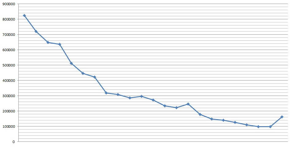 Demonstrativo de vendas da revista Superman entre 1965 e 1987. Em setembro de 1986 a revista teve seu título alterado para Adventures of Superman.